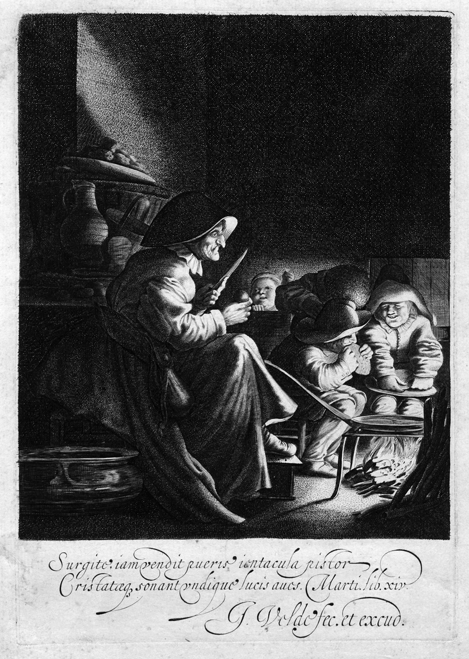 Die Pfannkuchenbäckerin. Radierung. 18,5 x 13 cm